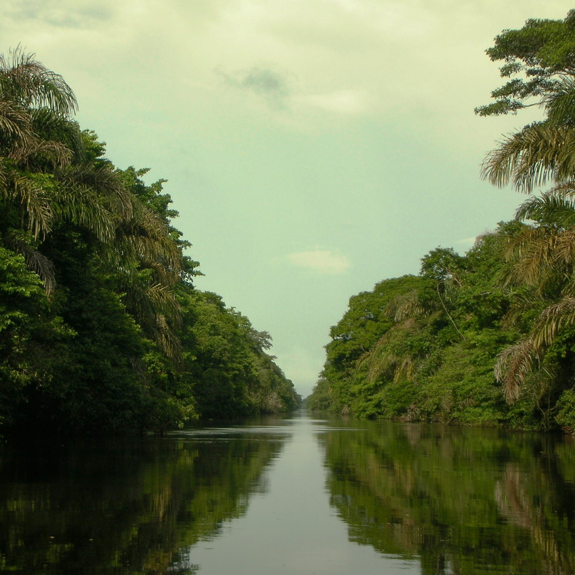 Waterway leading into Barra del Colorado, Costa Rica.